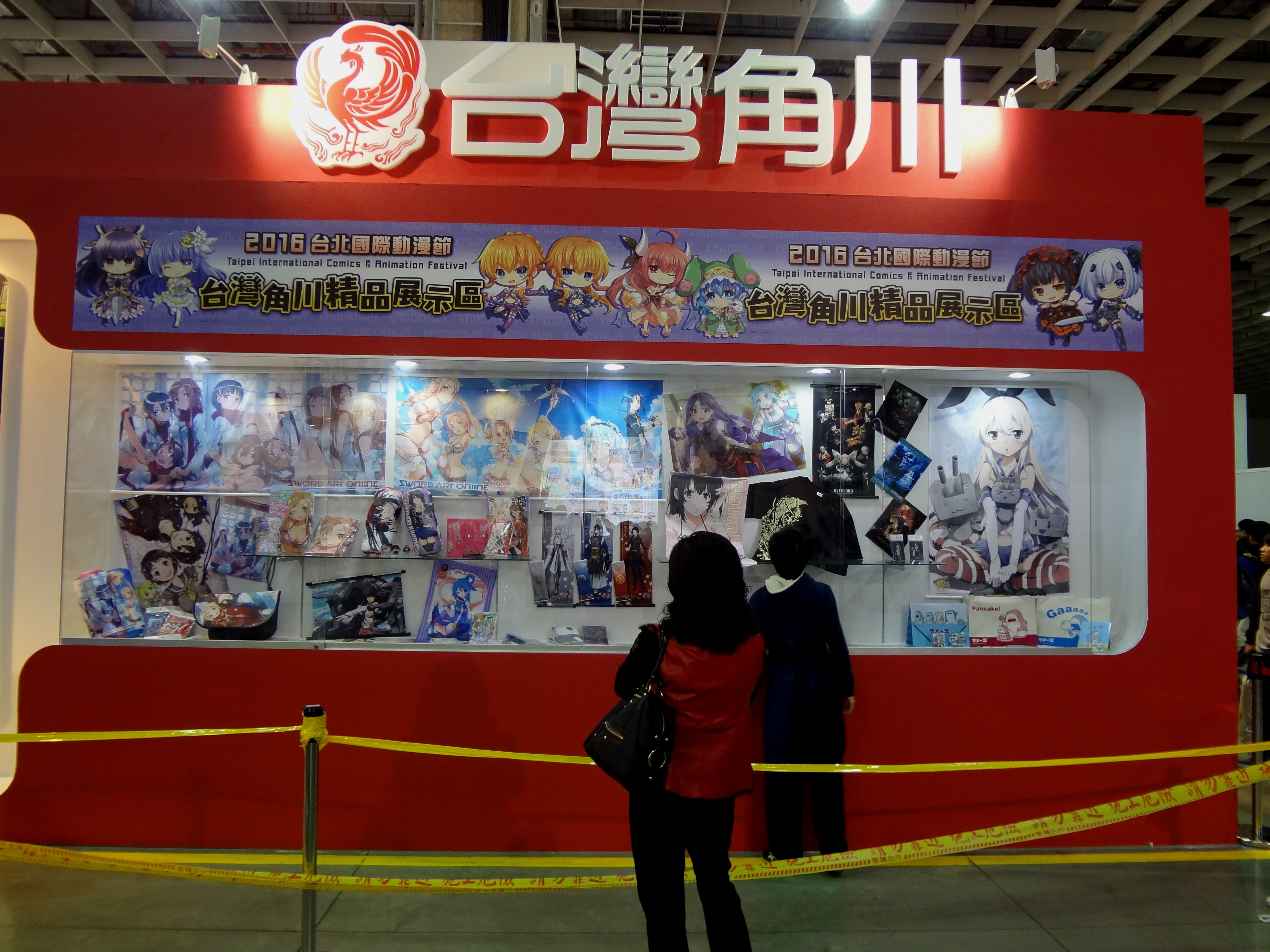 2016年第四屆台北國際動漫節，台灣角川攤位精品展示窗。